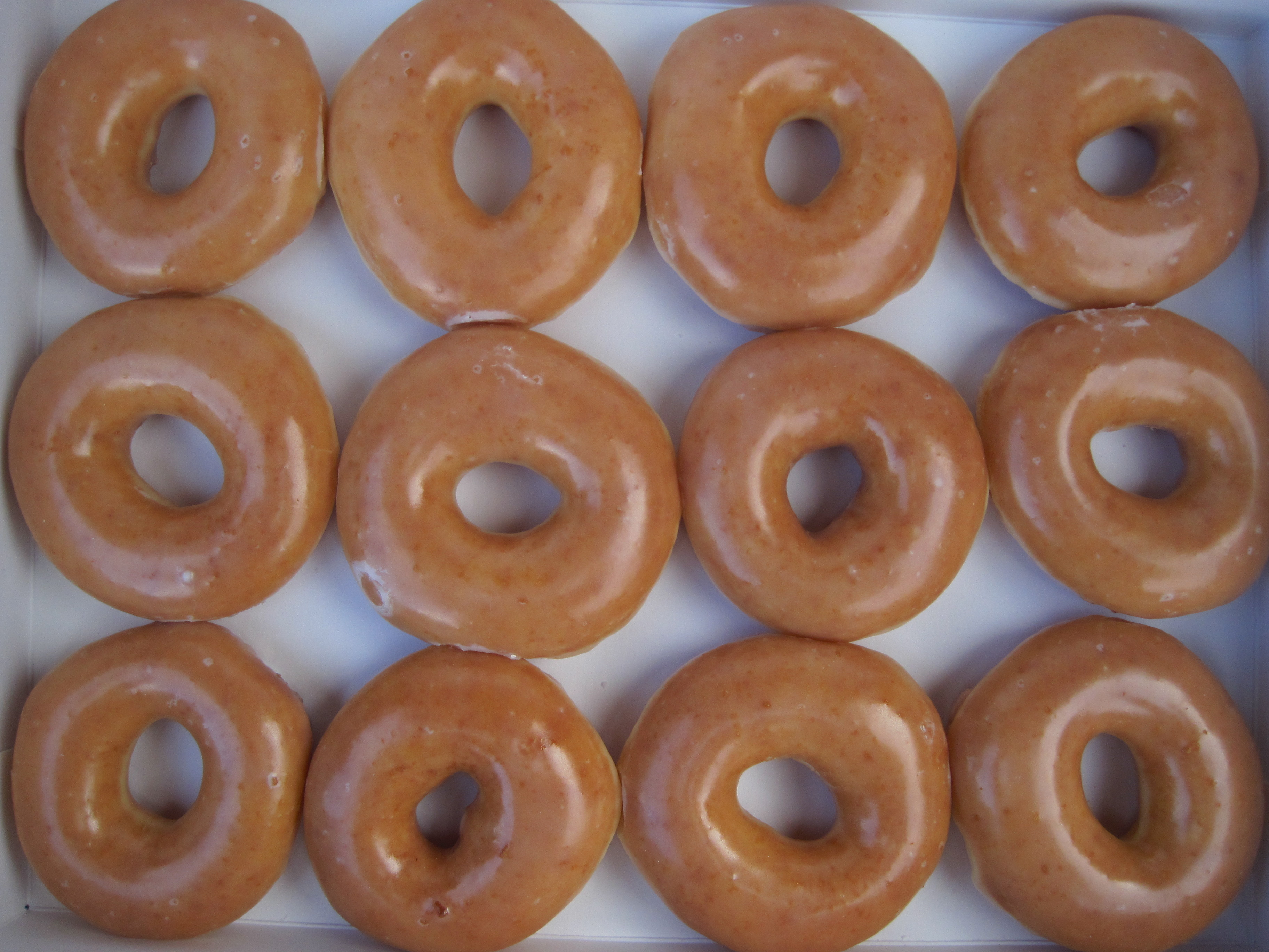 Krispy Kreme glazed donuts.